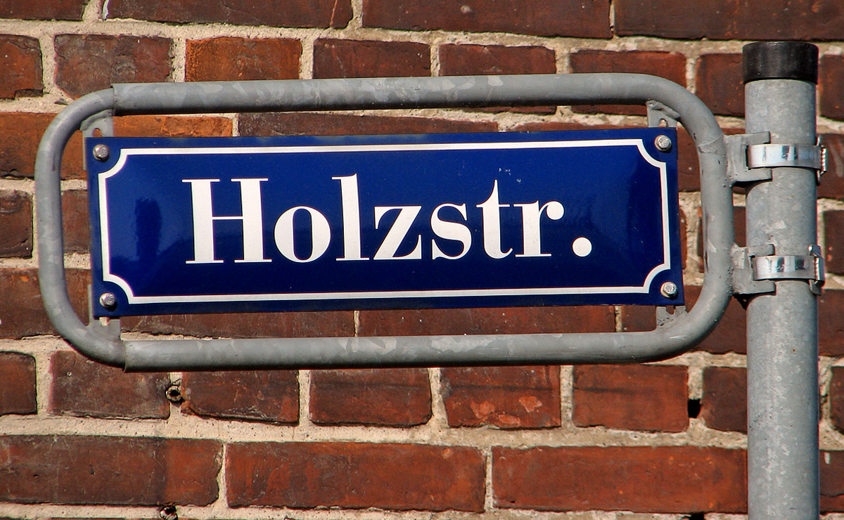 Dieses Bild zeigt ein Straßenschild Stralsunds.